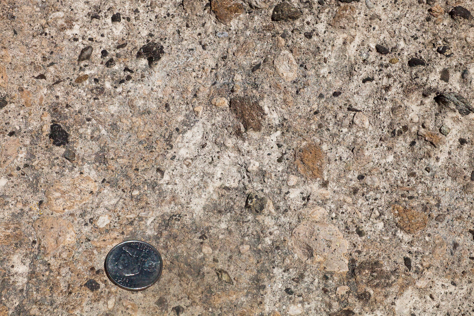 Bandelier Nat'l Monument